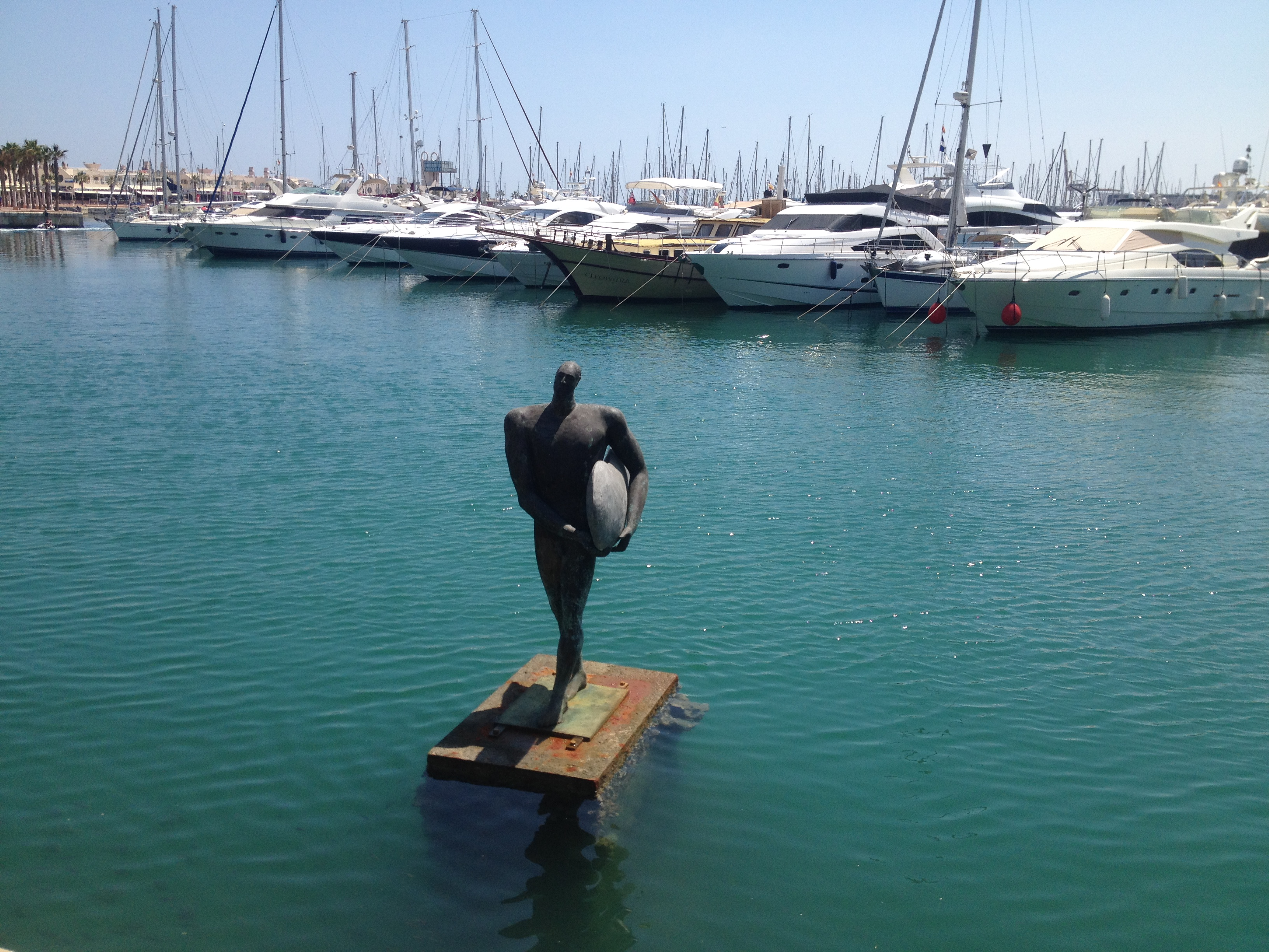 El Regreso de Icaro con su ala de surf.